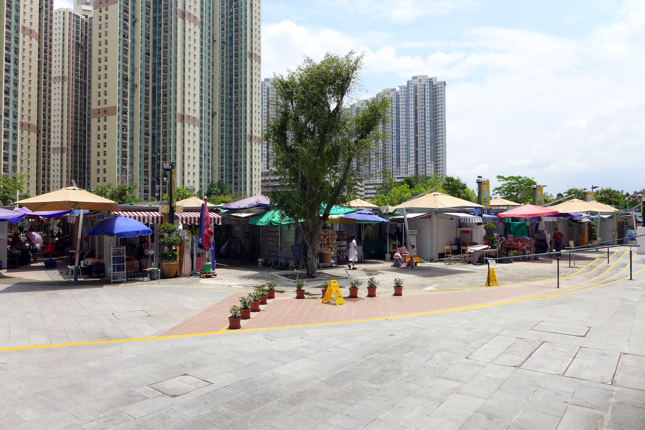 Tin Sau Bazaar